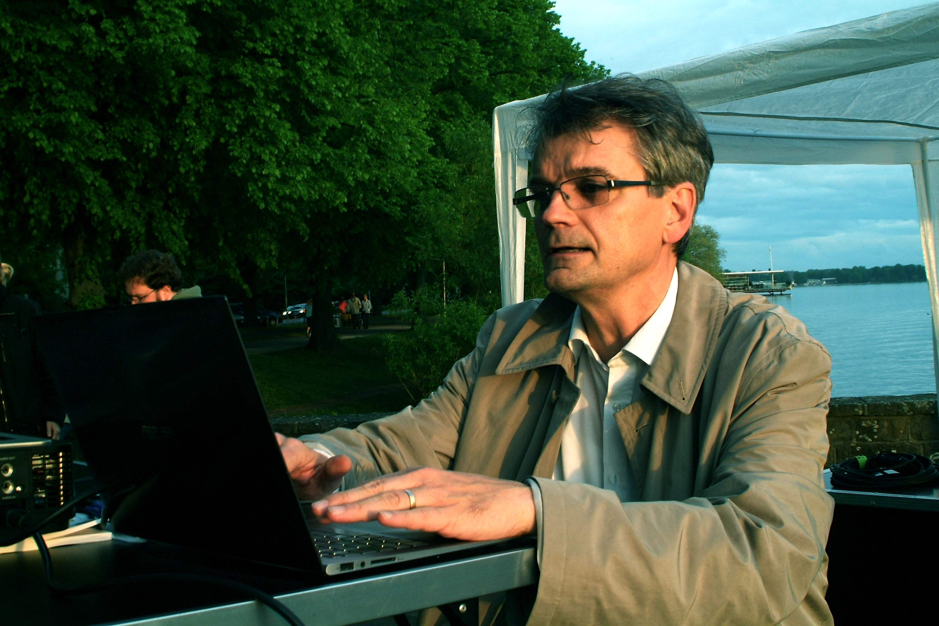 Momentaufnahmen zu "Das war ein Vorspiel nur ..." am Abend des 9. Mai 2012, Teil der Veranstaltungsreihe "Hannover im Wort. Zeichen zum Gedenken an die nationalsozialistische Bücherverbrennung." Am authentischen Ort informierten Mitarbeiter des Gemeinschaftsprojektes und andere an der Geibelbastion am Maschsee unter anderem über das Vorspiel 1933 an der Bismarcksäule in Hannover.